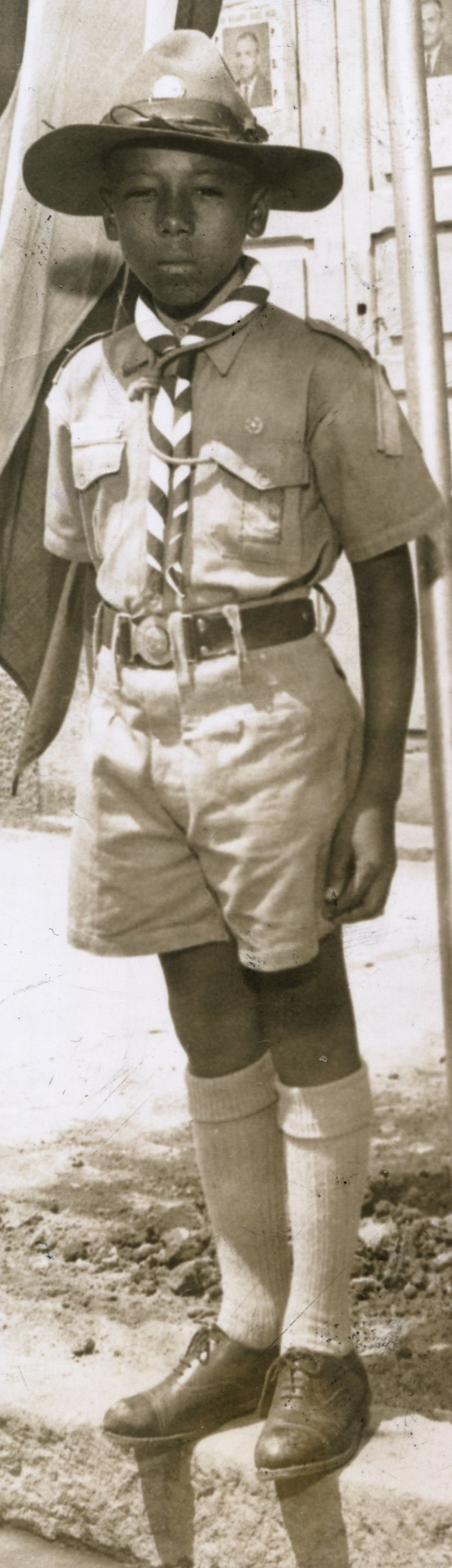 Fotografia do Fundo Correio da Manhã, sob a guarda do Arquivo Nacional.